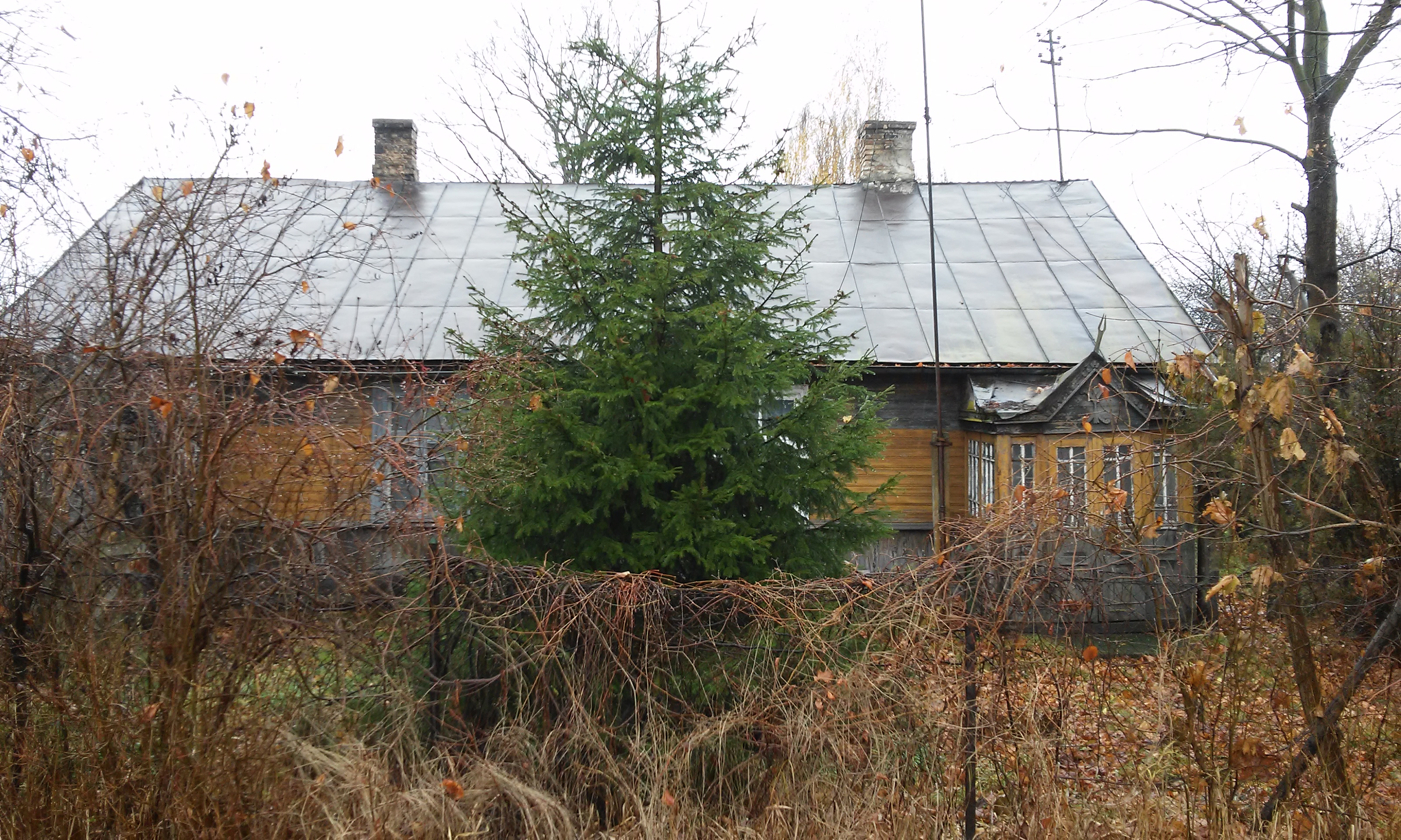 Budynek przy wyjeździe z Chotyłowa w kierunku Piszczaca